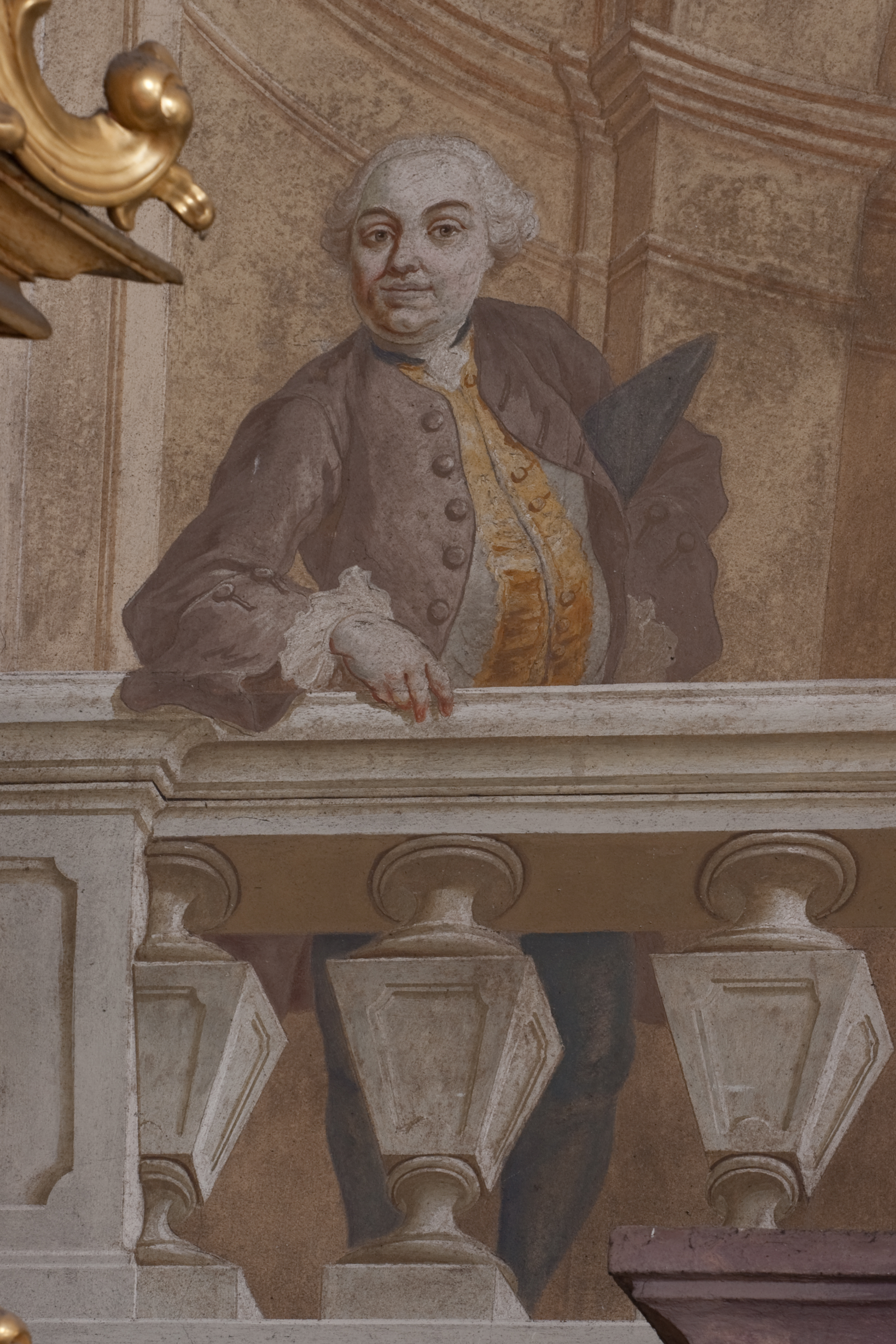 Na fotografii je portrét malíře Jana Lukáše Krackera, který se nachází na fresce v kostele sv. Petra a Pavla v Nové Říši.